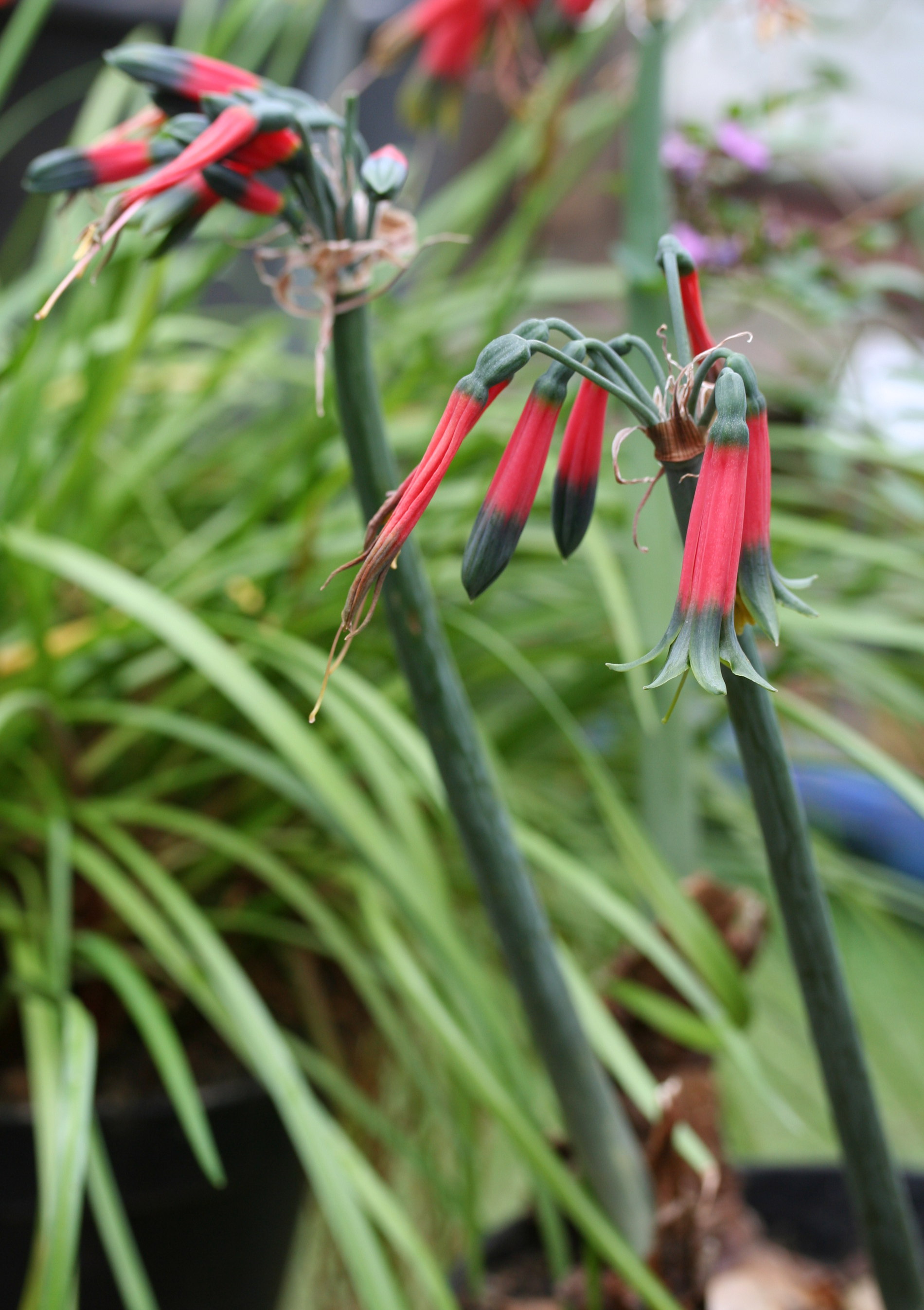 Phaedranassa tunguraguae im Botanischen Garten Dresden